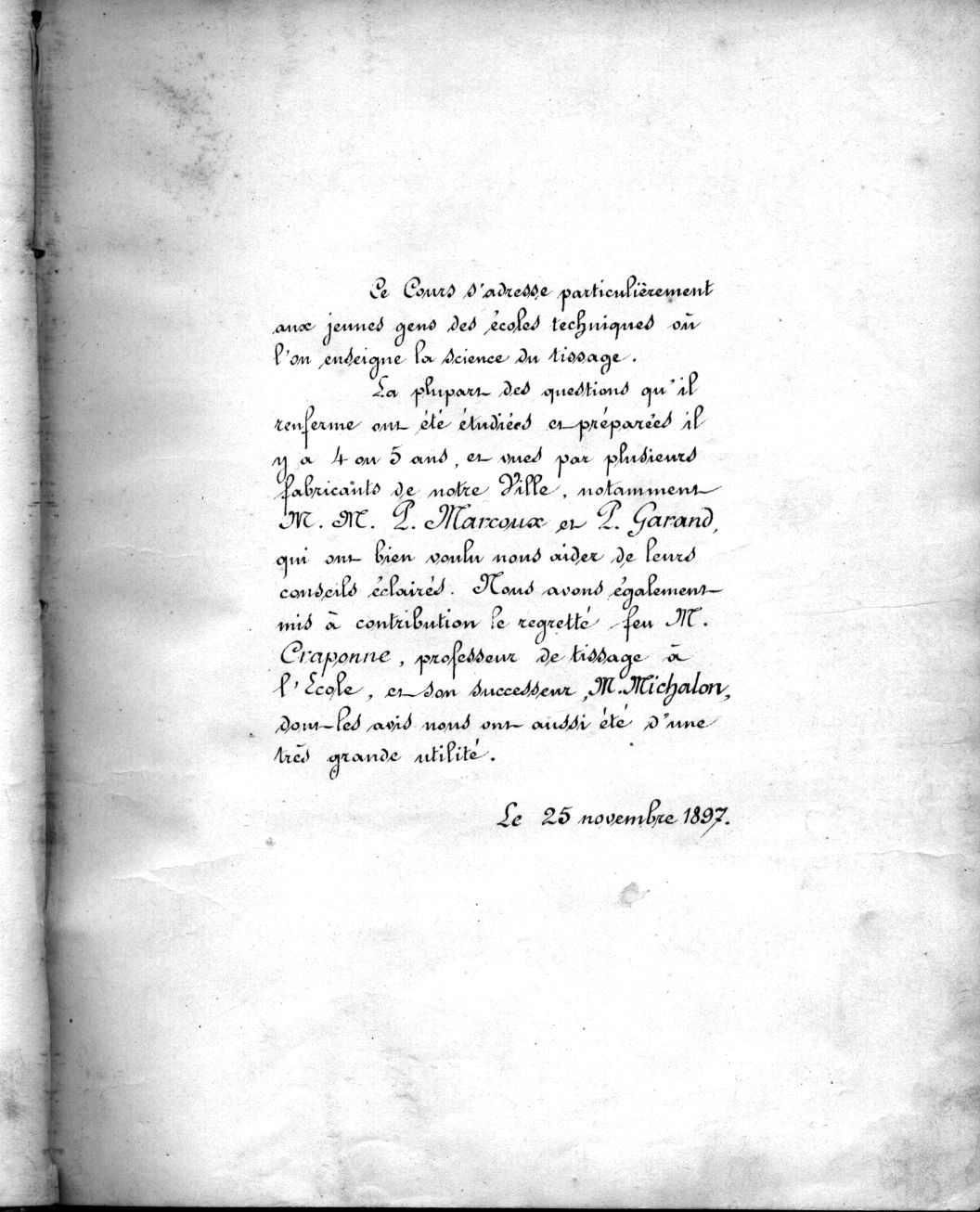 Livre édité en autographie. "Cours élémentaire de Tissage - Tissus unis" Page de présentation. Tout le livre est en écriture manuscrite.